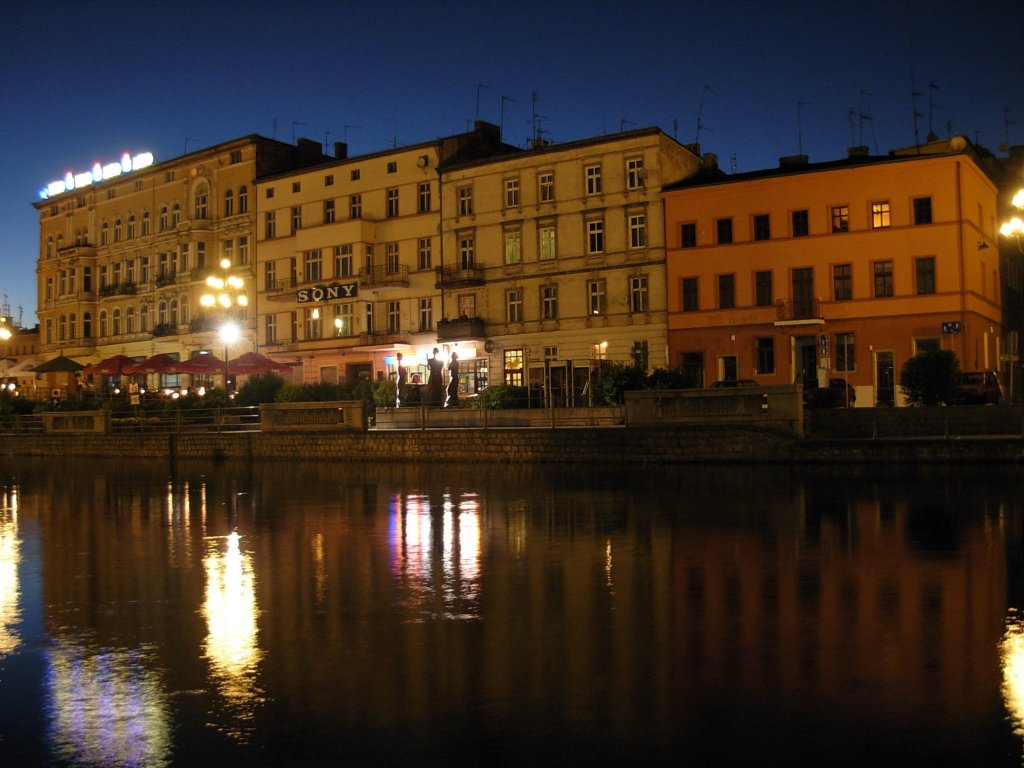 Kamienice nad Brdą